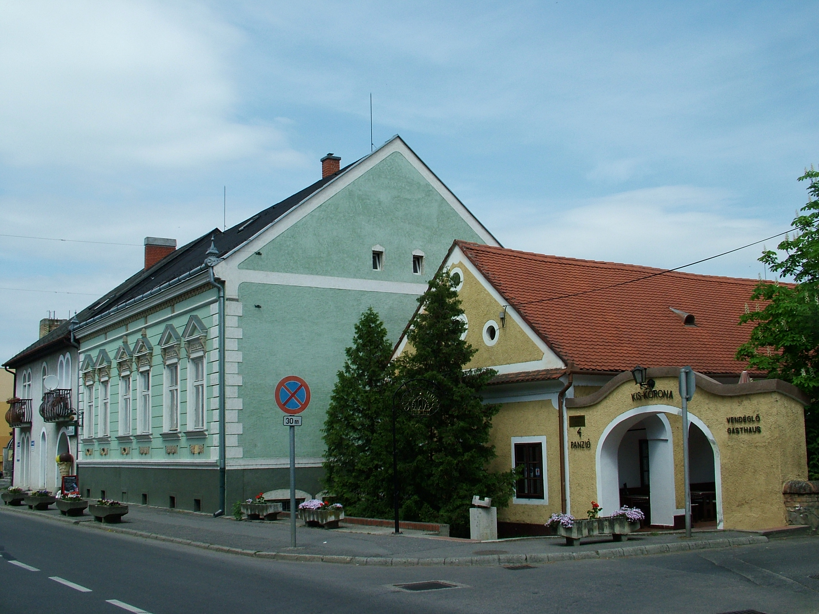 Zalaszentgrót belvárosa, Eötvös Károly utcai lakóház, Deák Cukrászda és Cukrászműhely, Kis-Korona Vendéglő